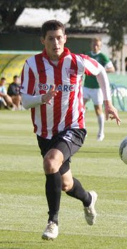 Mateusz Żytko, piłkarz Cracovii